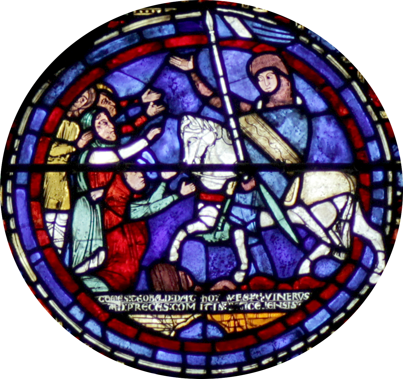 le zodiaque et les travaux des mois (lancette gauche, baie 28a). Donateur comte de Chartres.